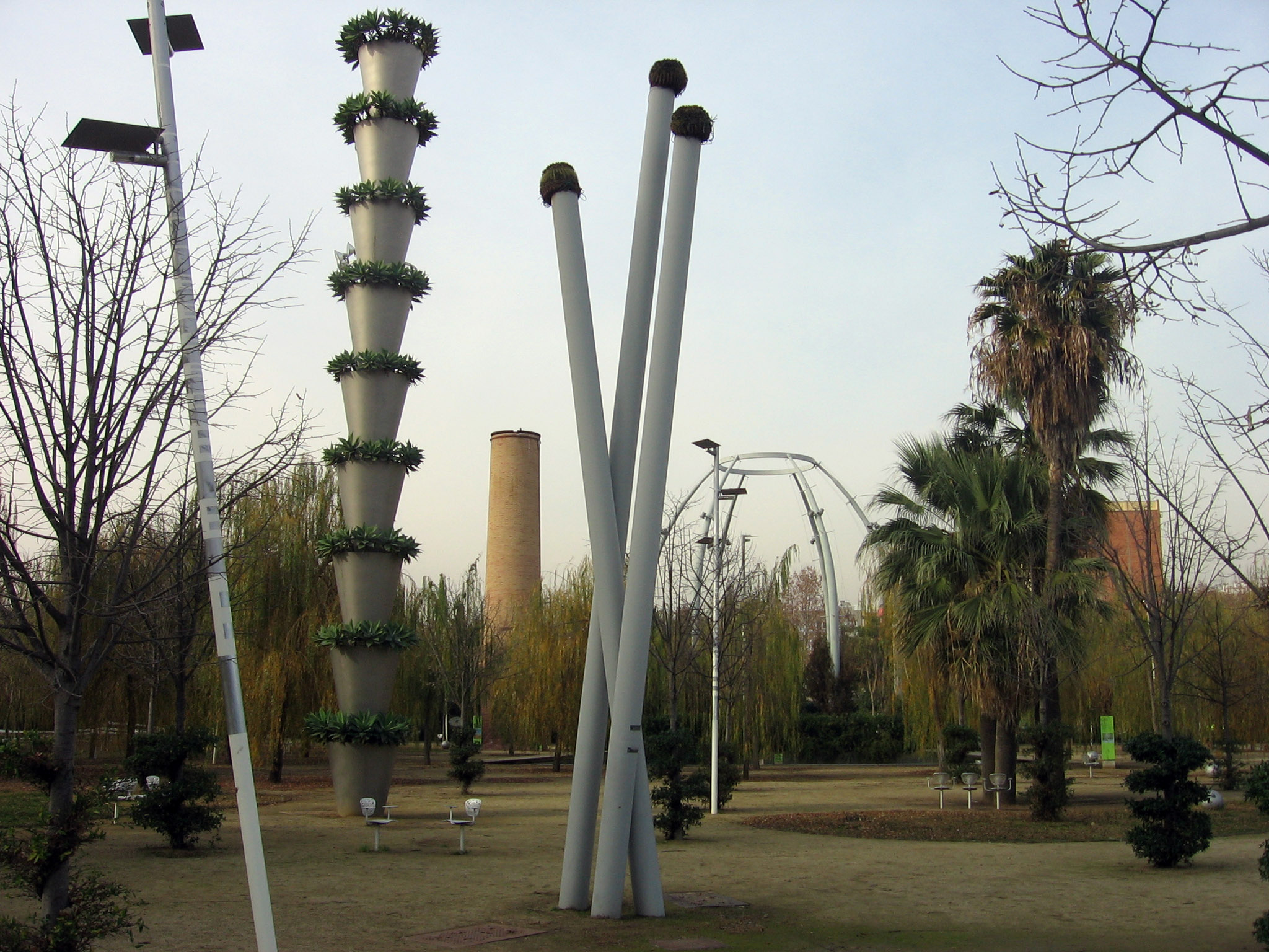 Parque del Centro del Poblenou.